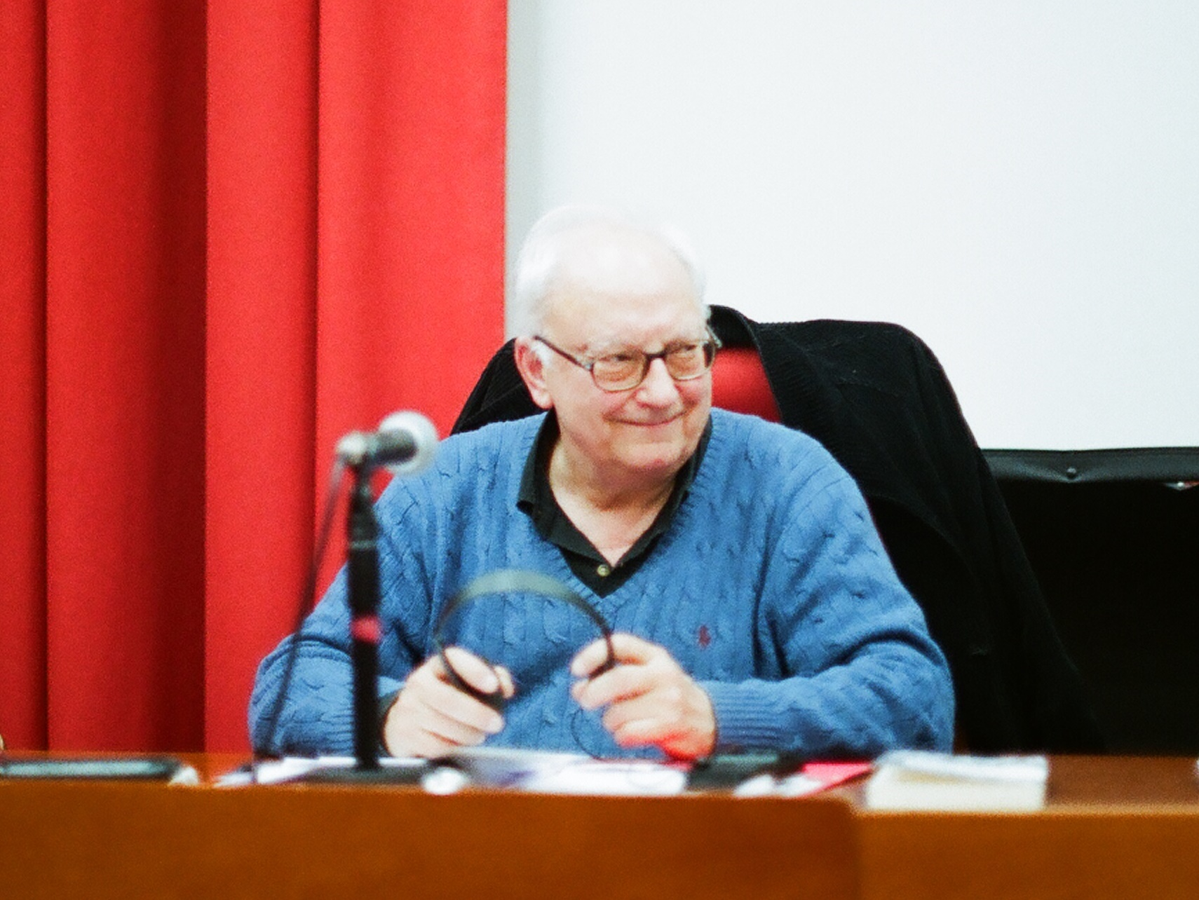 French philosopher Étienne Balibar in 2011